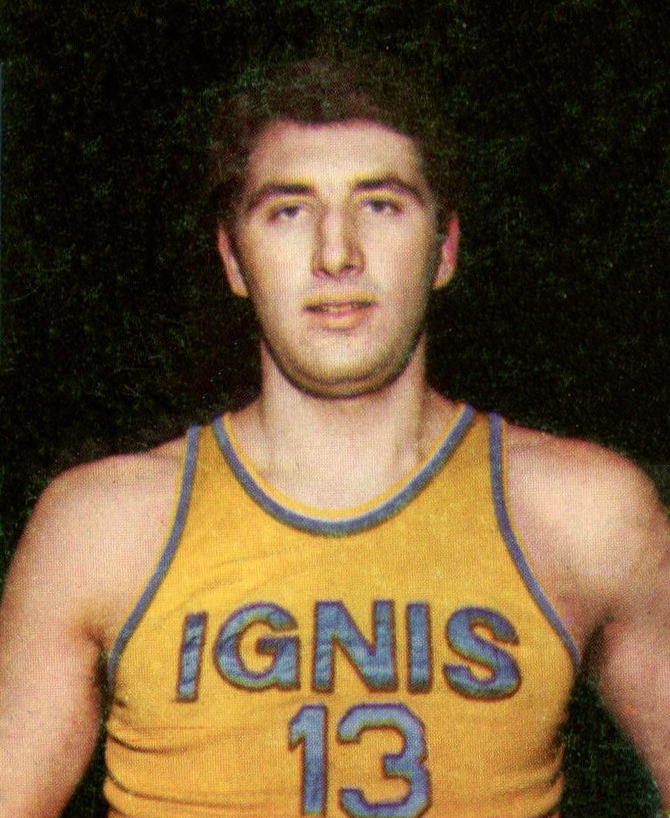 Figurina/Sticker CAMPIONI DELLO SPORT 1968/69 - n. 261 - E. BOVONE -ITA-New